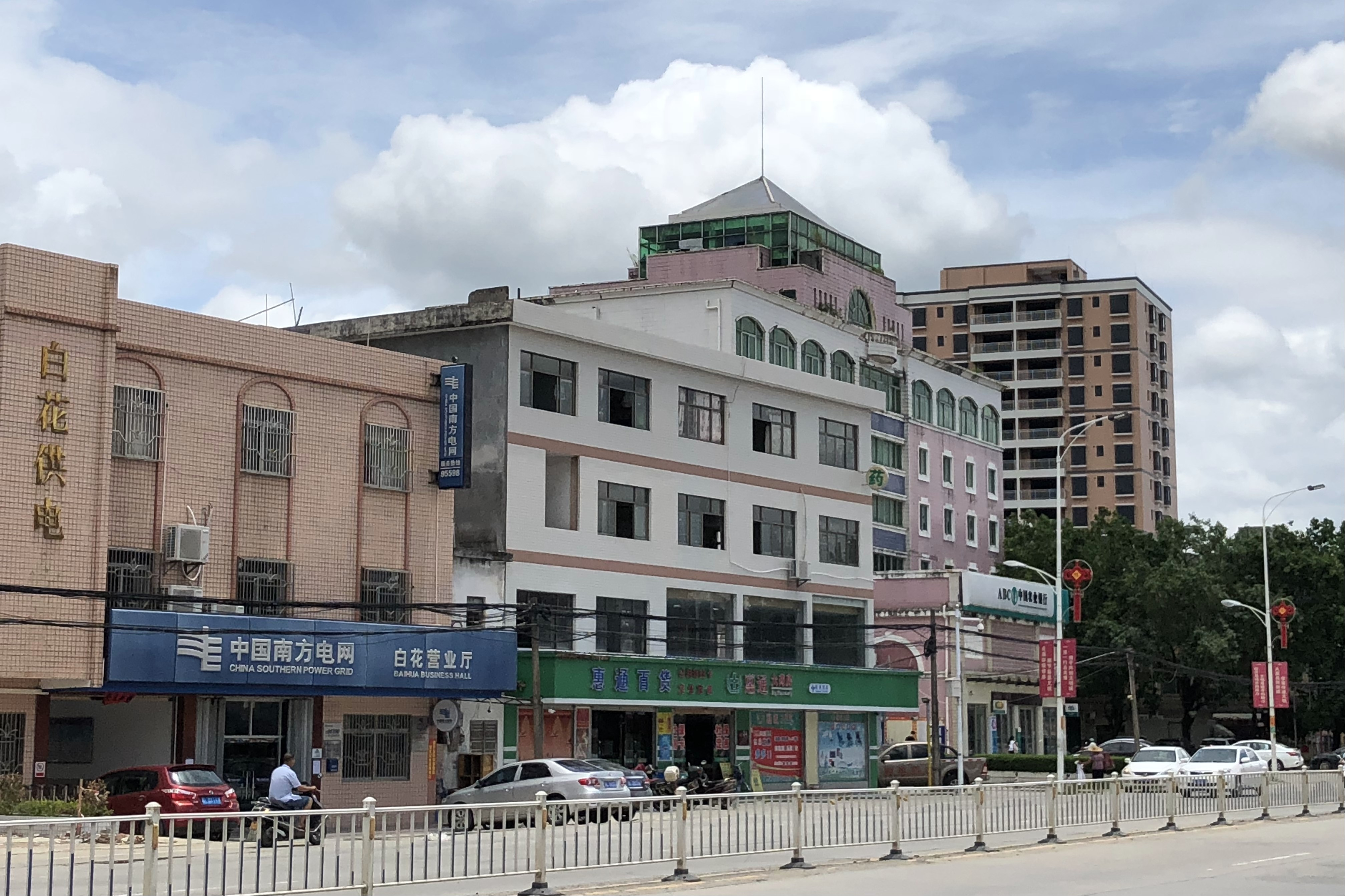 白花供电、农行